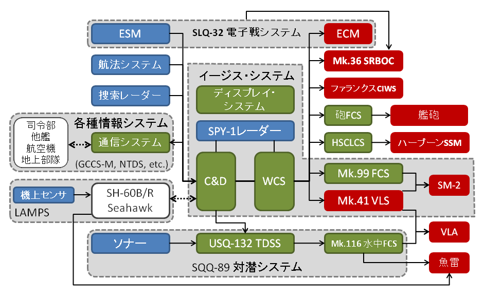 イージス武器システム ベースライン6以前を搭載するイージス艦のイージス戦闘システムの構成。参考文献は下記。大熊康之 (2006) 軍事システム エンジニアリング, かや書房 ISBN: 4-906124-63-1.